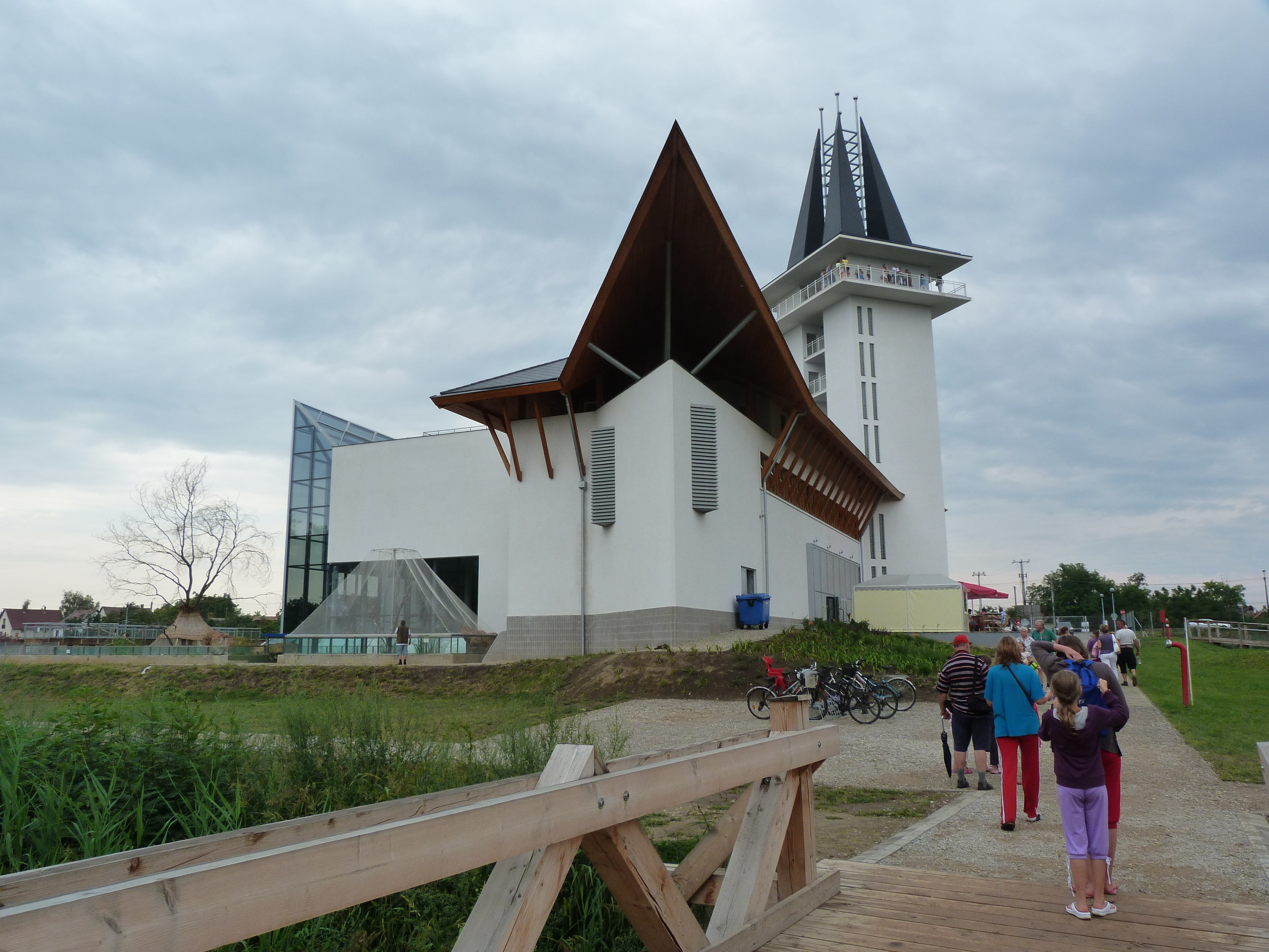 A felvétel 2012. július 25 -én készült Poroszlón, a Tisza-tavi Ökocentrumban. Megjelent Creative Commons alatt a Metapolisz DVD sorozatban. Forrás: tiszataviokocentrum.hu